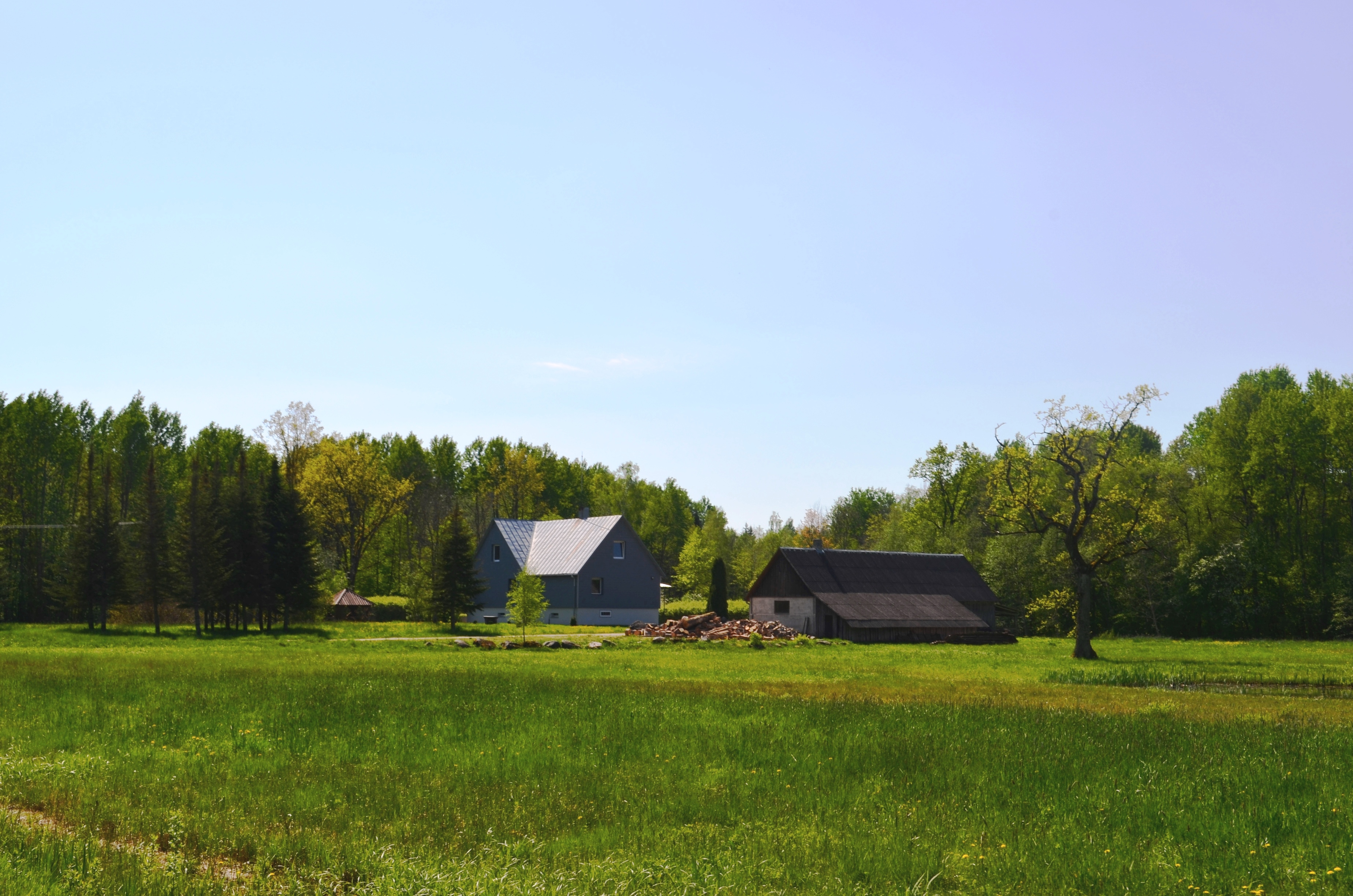 Taujėnų girininkija, Taujėnų sen., Ukmergės raj.